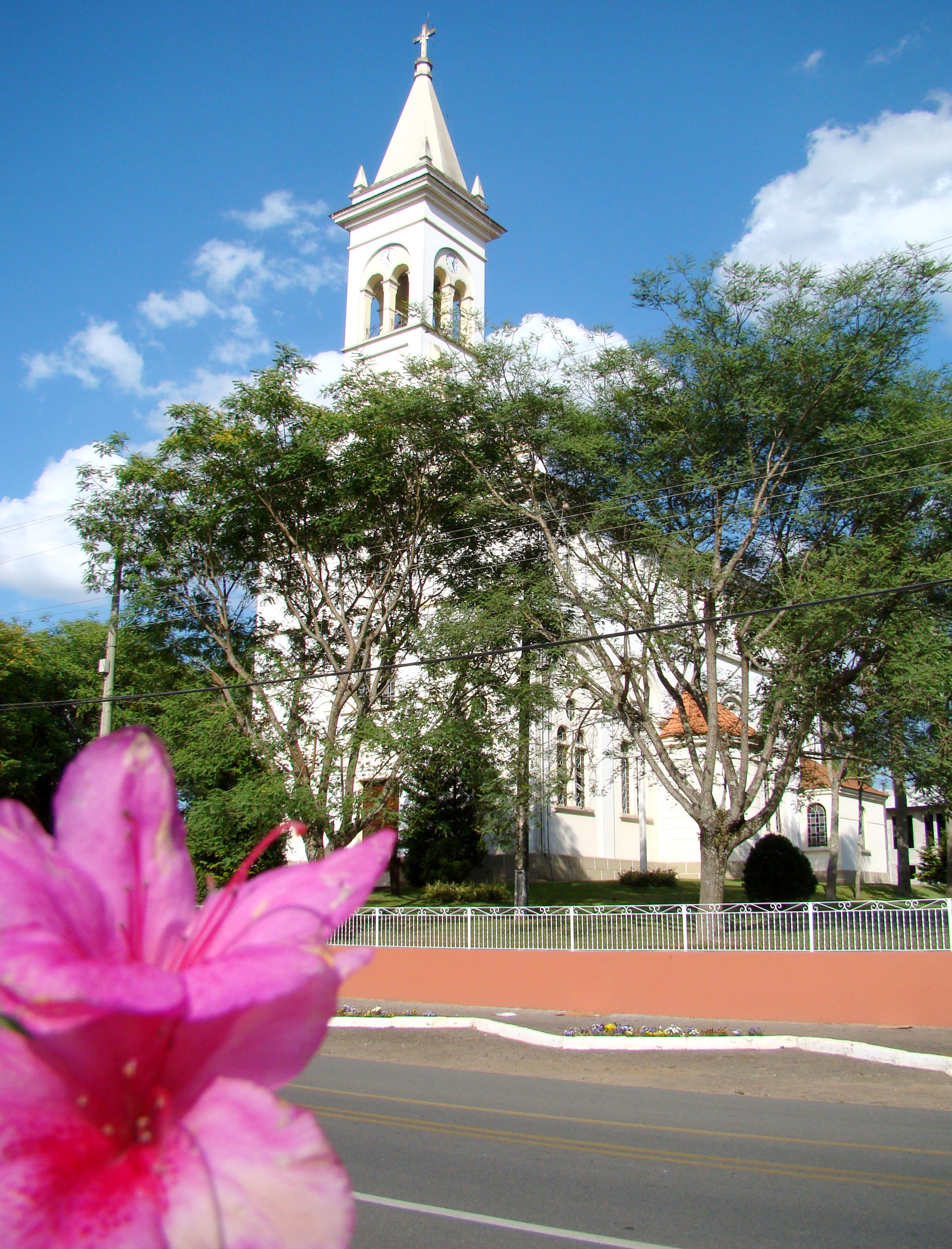 Igreja Matriz - Paróquia Senhor Bom Jesus - de Balsa Nova, Paraná, Sul do Brasil.